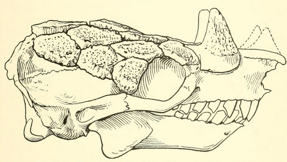 Peltephilus ferox skull